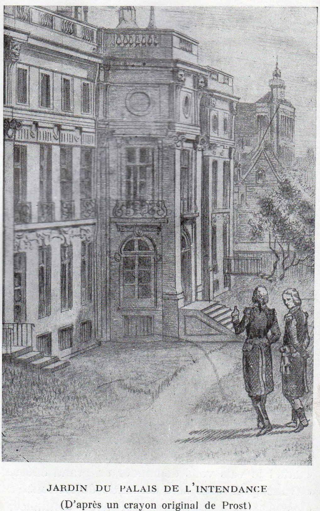 Bâtiment et jardin de l'Intendance de Dijon, depuis préfecture de Bourgogne